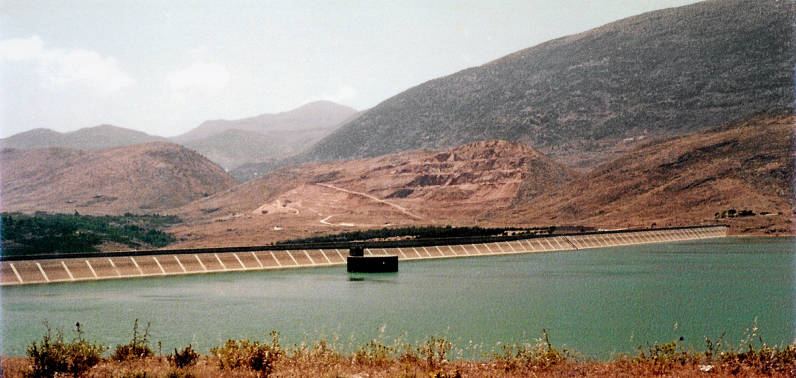 Lake Qaraoun, Lebanon